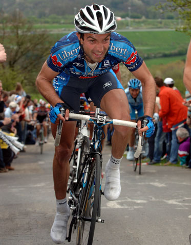 Afbeelding van Angel Vicioso.